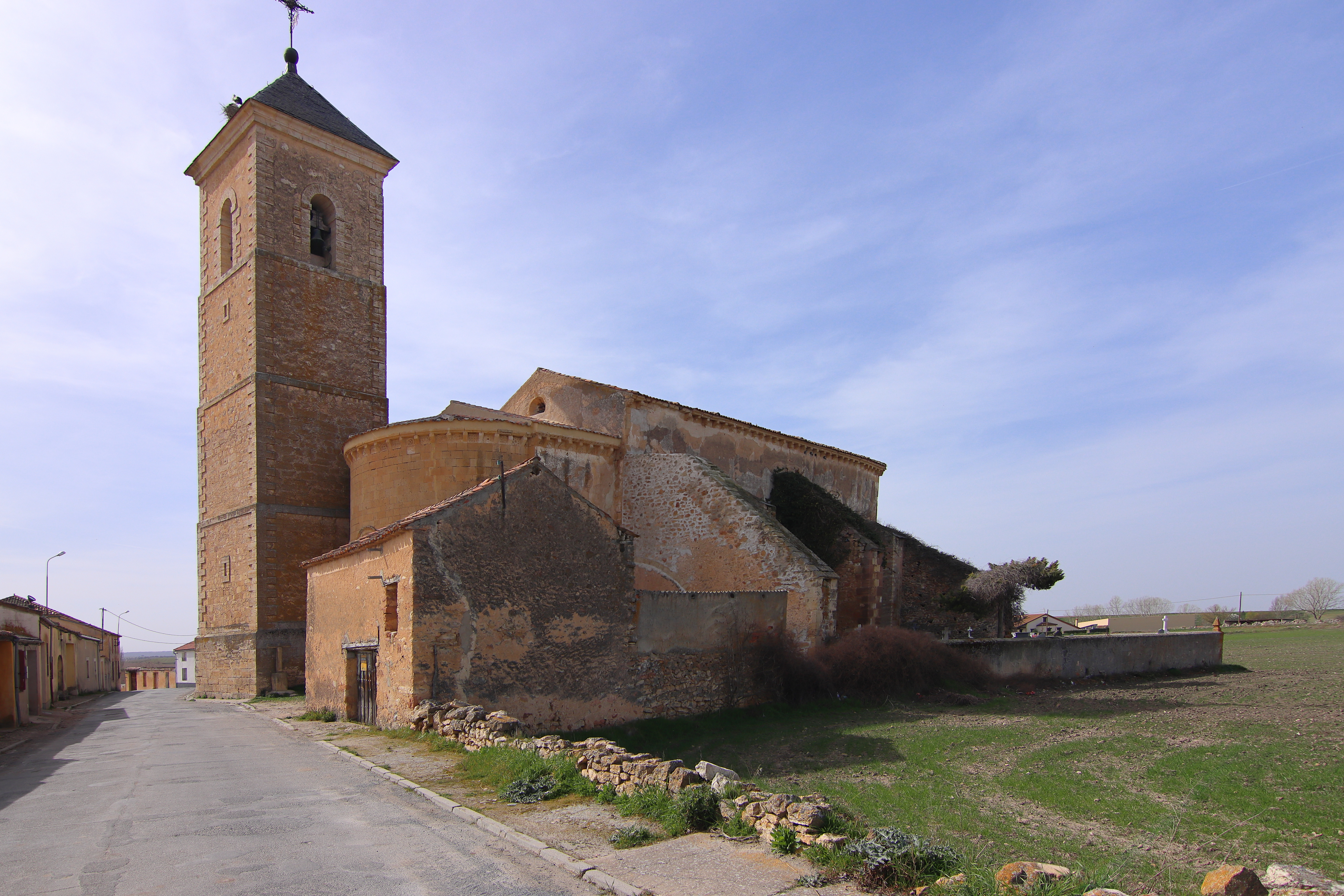 Iglesia de Nuestra Señora de la Asunción, Torreiglesias, fachada norte